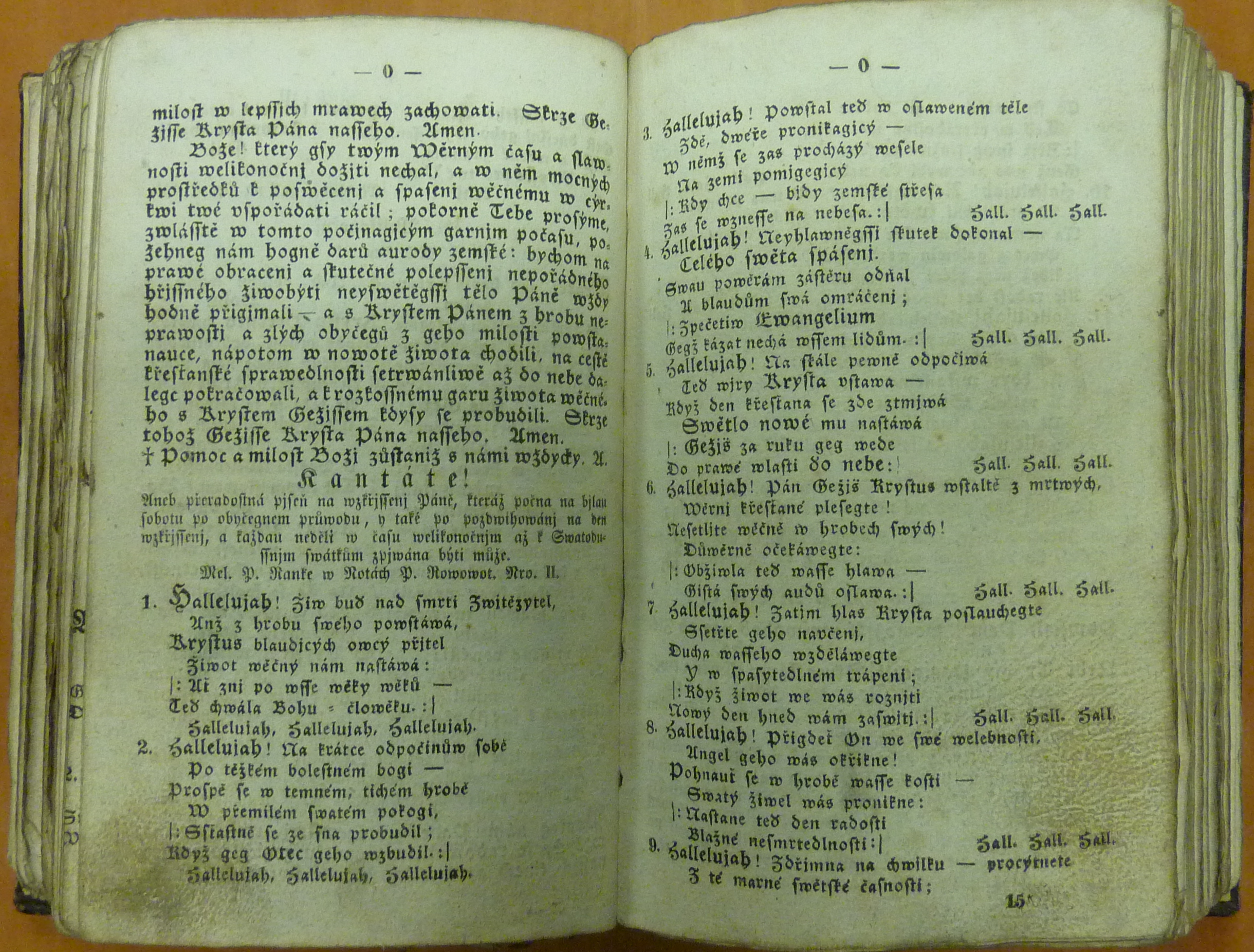 Hallelujah! Živ buď nad smrtí Zvítězitel, 1–9 (Katolický kancionál k vzdělání a roznícení skutečné, veřejné i domácí pobožnosti. Složený od Tomáše Fryčaje, bývalého faráře v Obřanech blíž Brna. … Vydání desáté. V Brně 1851. Vytištěný u Františka Šastla.)